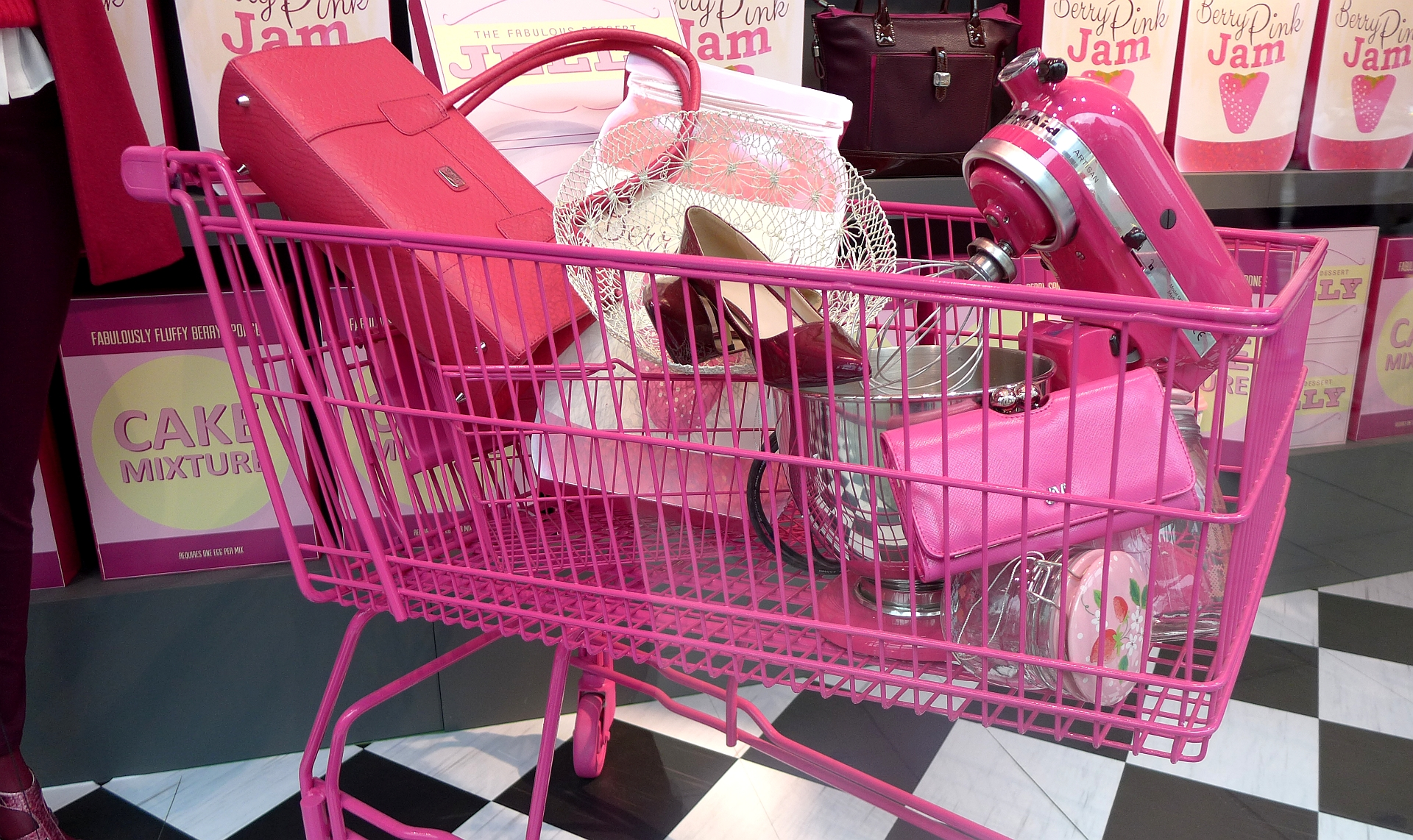 Alles in Pink: Handtasche, Schuhe, Küchenmaschine, Trolley. London im Oktober 2014.